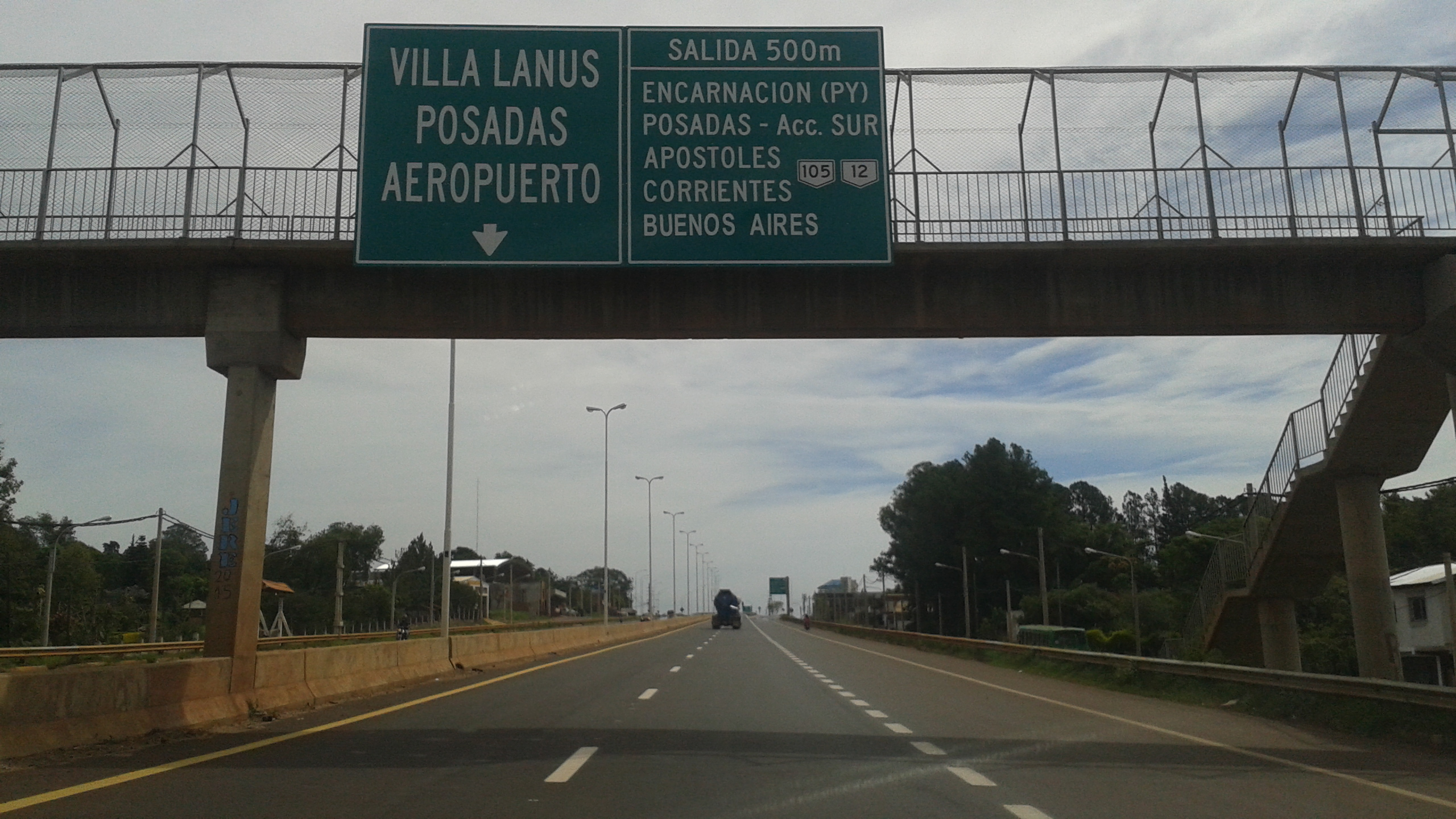 Cartel Villa Lanús (Posadas, Provincia de Misiones, Argentina)